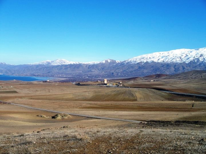 MALATYA KALE ilçesi